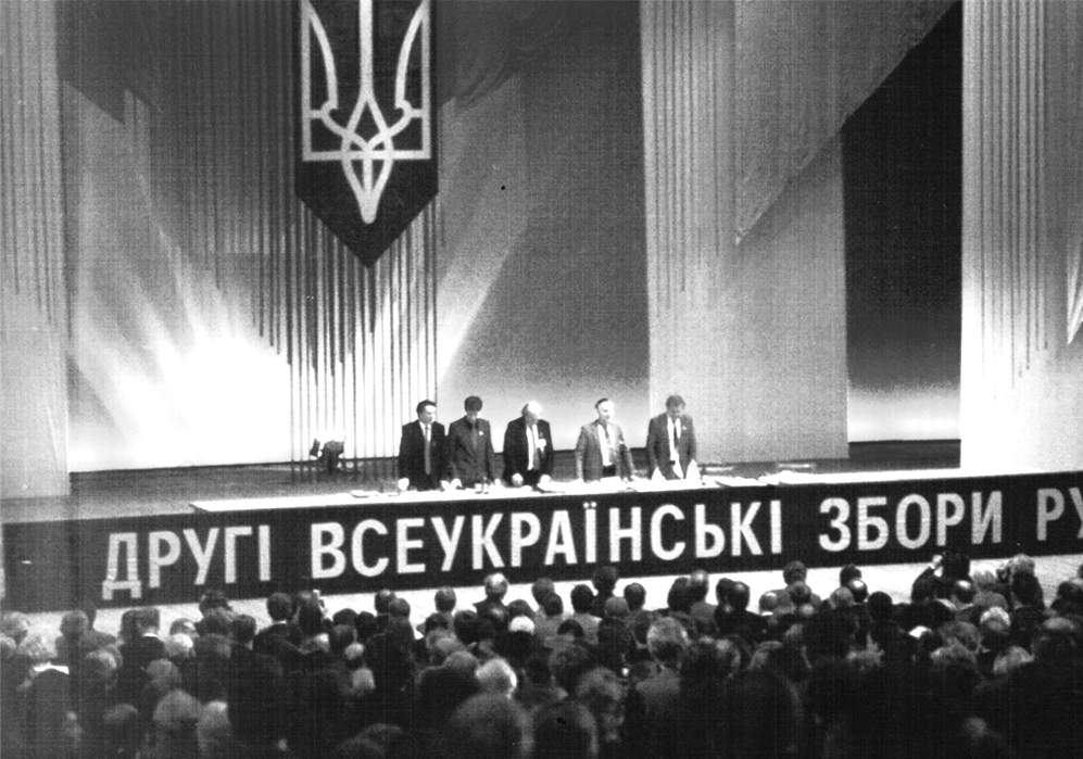 Другі Всеукраїнські Збори (З'їзд НРУ)